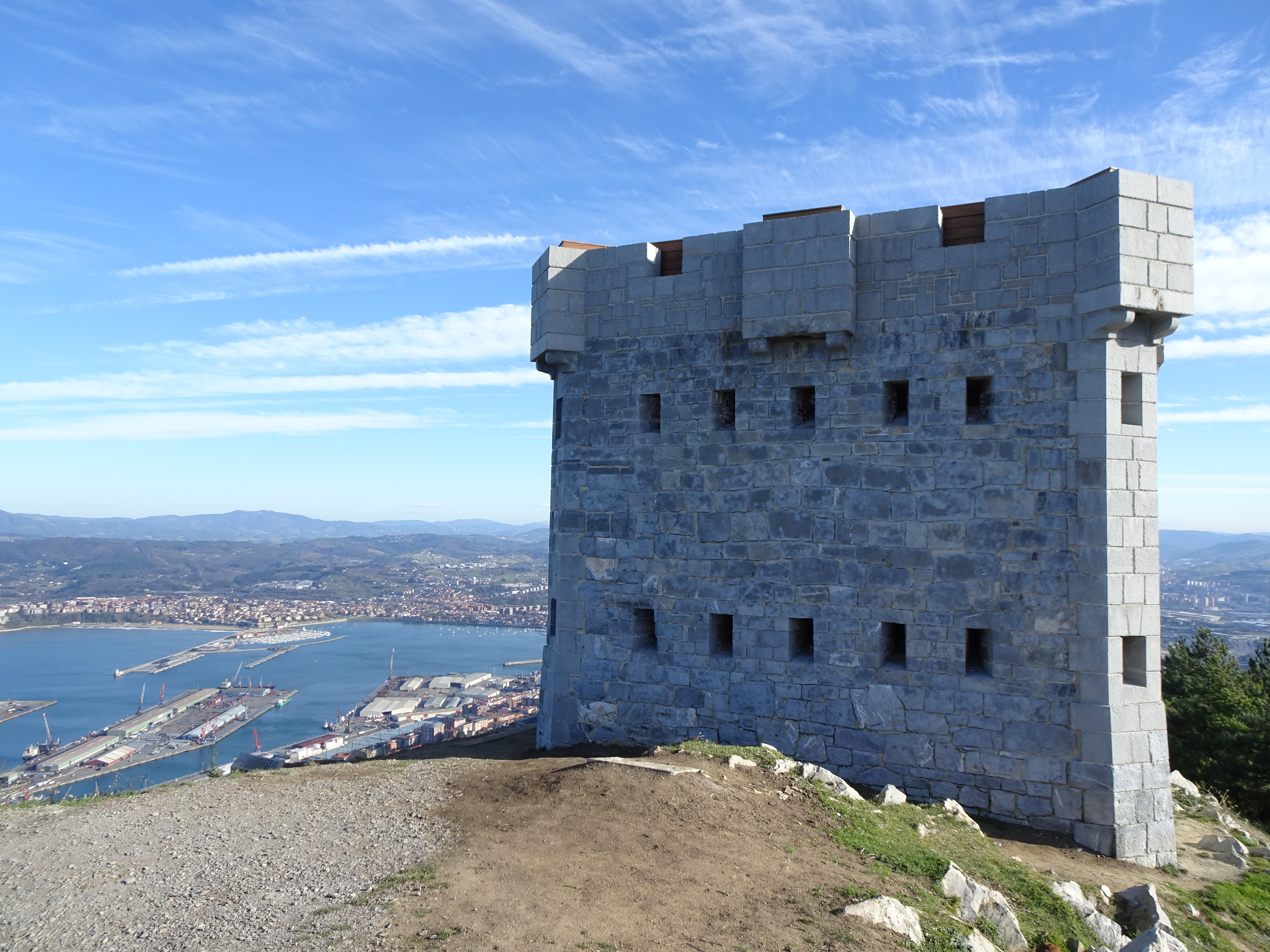 Torreón del Serantes restaurado en su totalidad